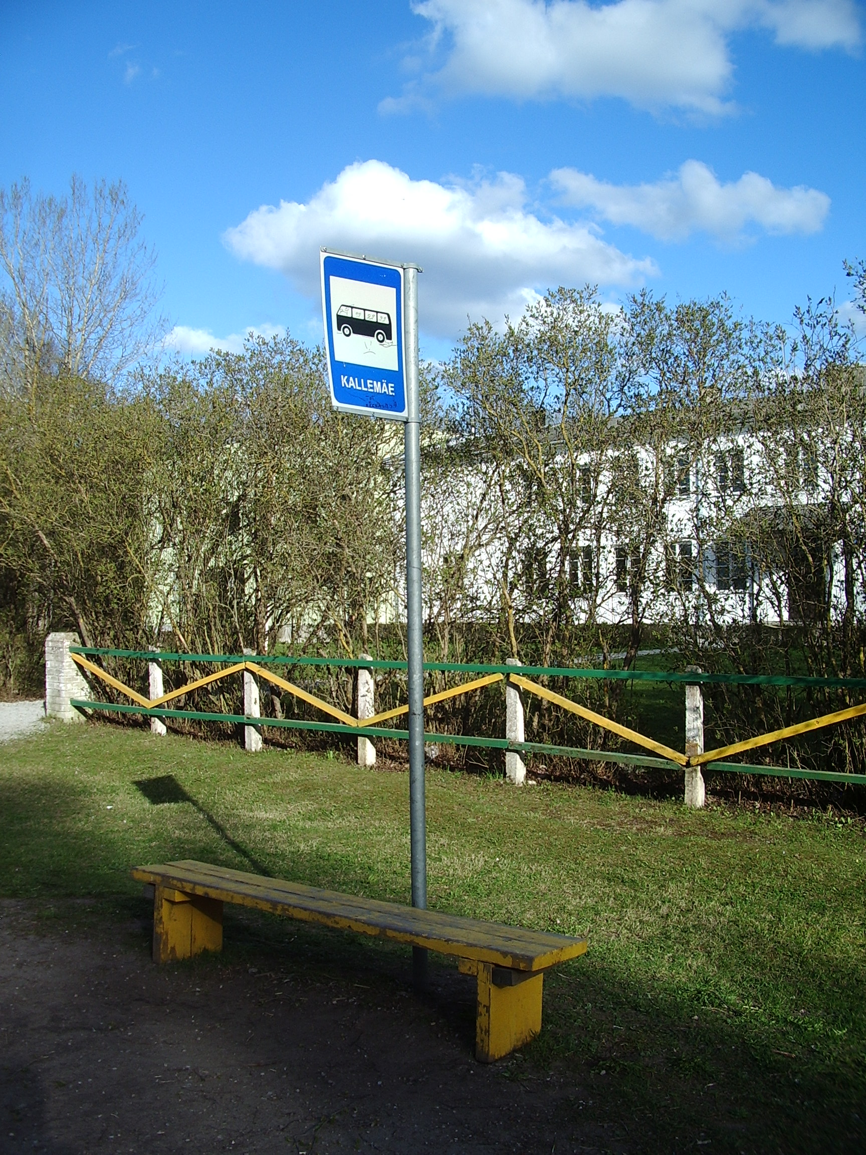 Bus stop in village Kallemäe, Valjala parish